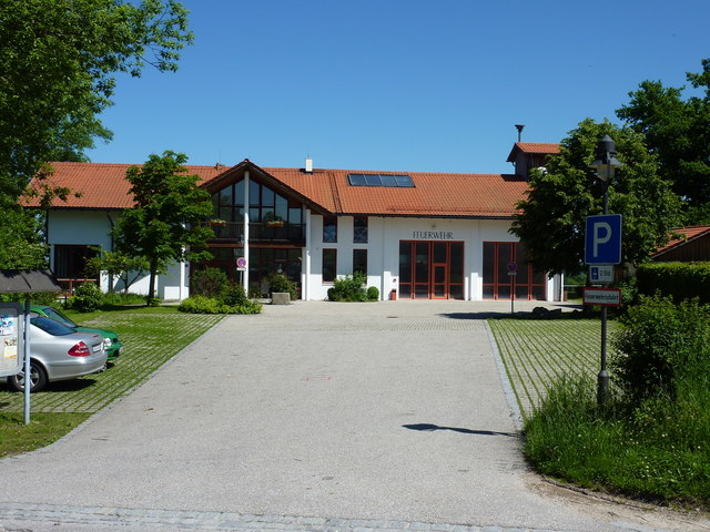 Ising: Feuerwehr , 12 km from Traunstein, Deutschland (Zone 33).